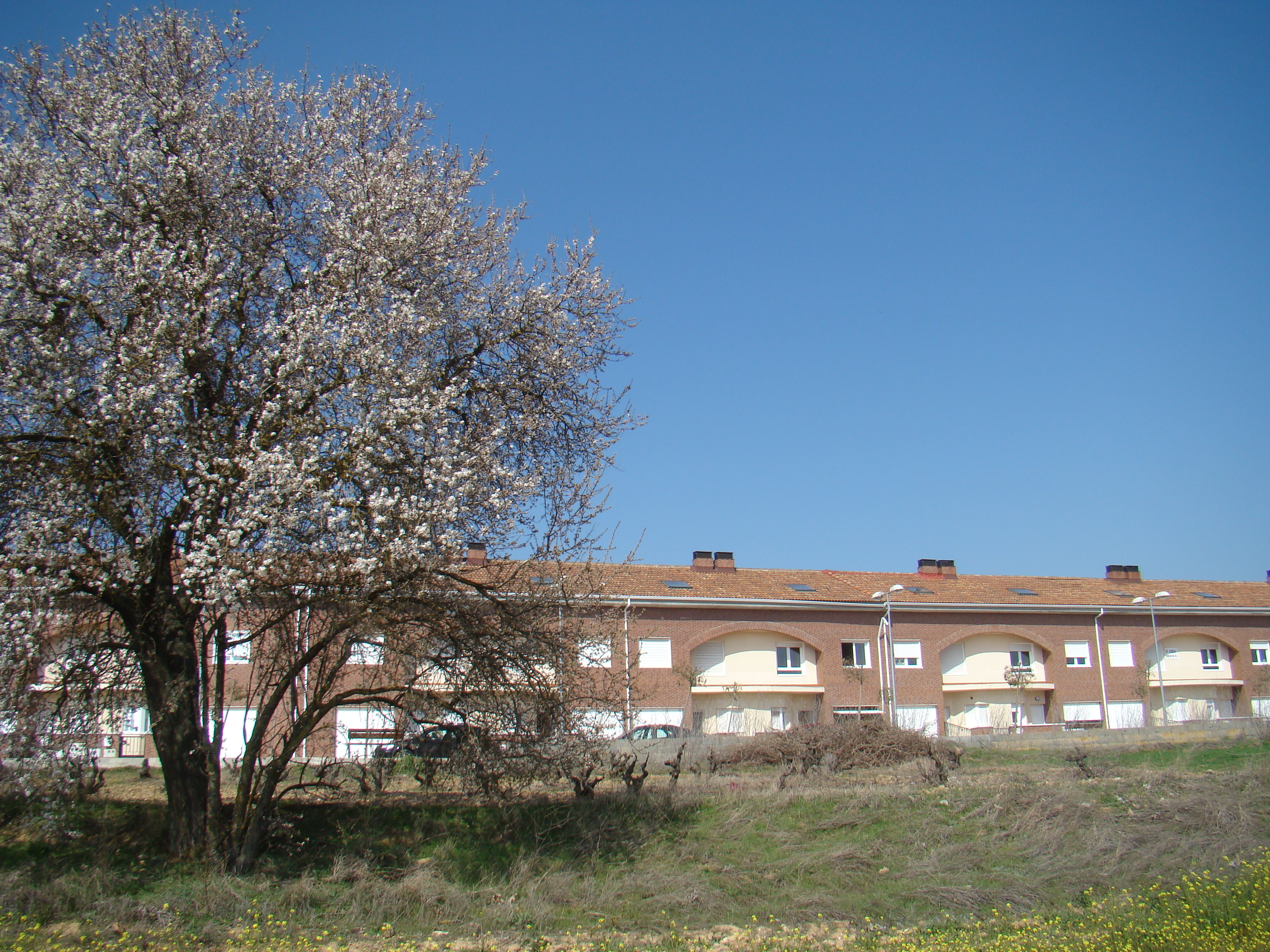 Urbanismo moderno en Cigales (Valladolid, España). Zona de chalets adosados.